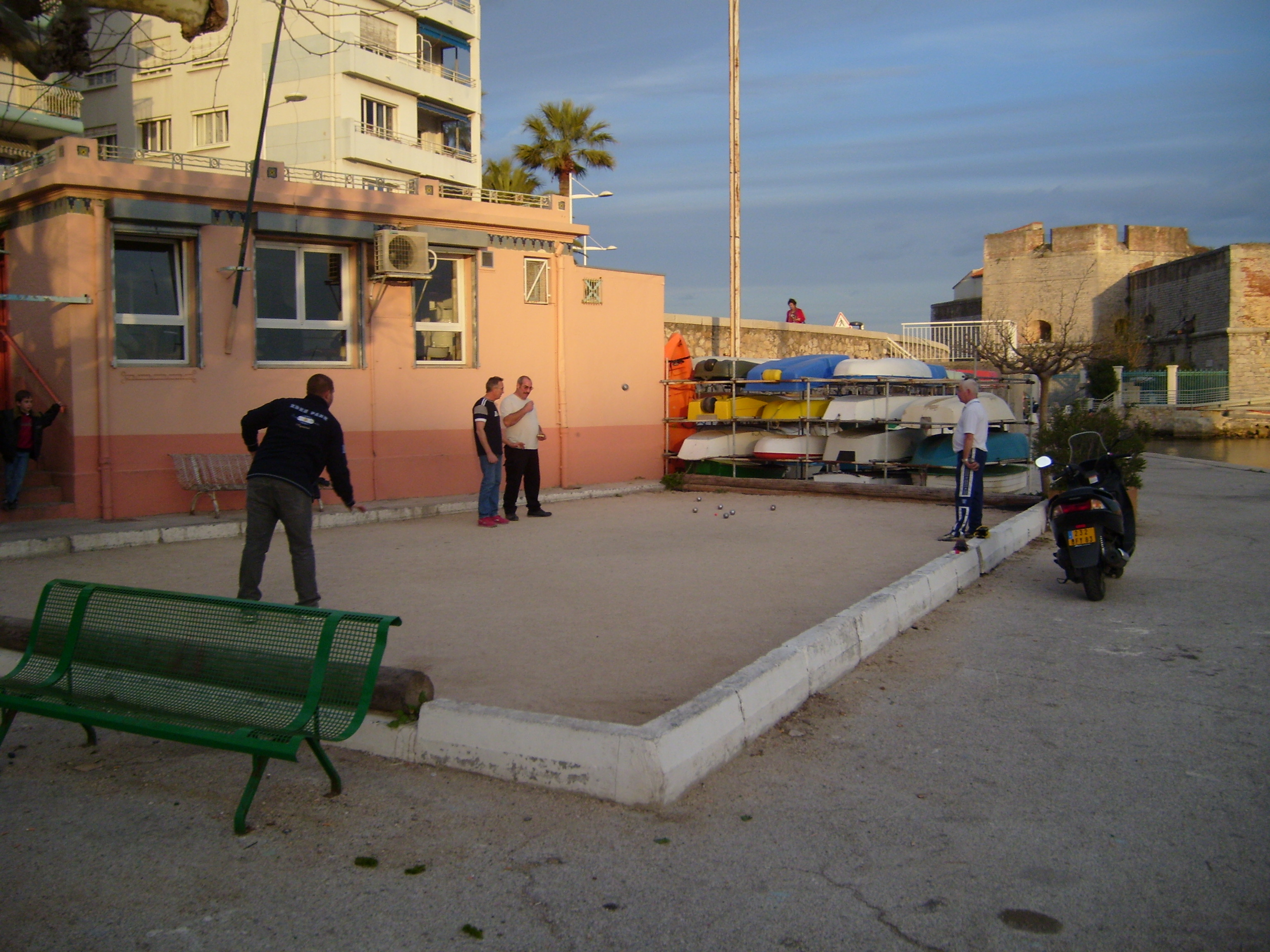 Men playing boules, or petanque, next to Fort St. Louis, Le Mourrilon, Toulon, France